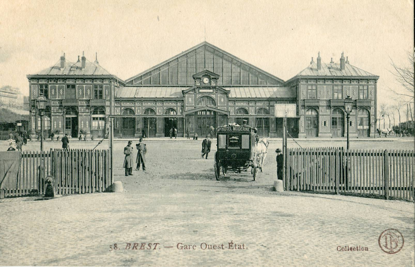 Carte postale ancienne éditée par DF N°58Brest, France : La GareIl s'agit de la Gare de 1865